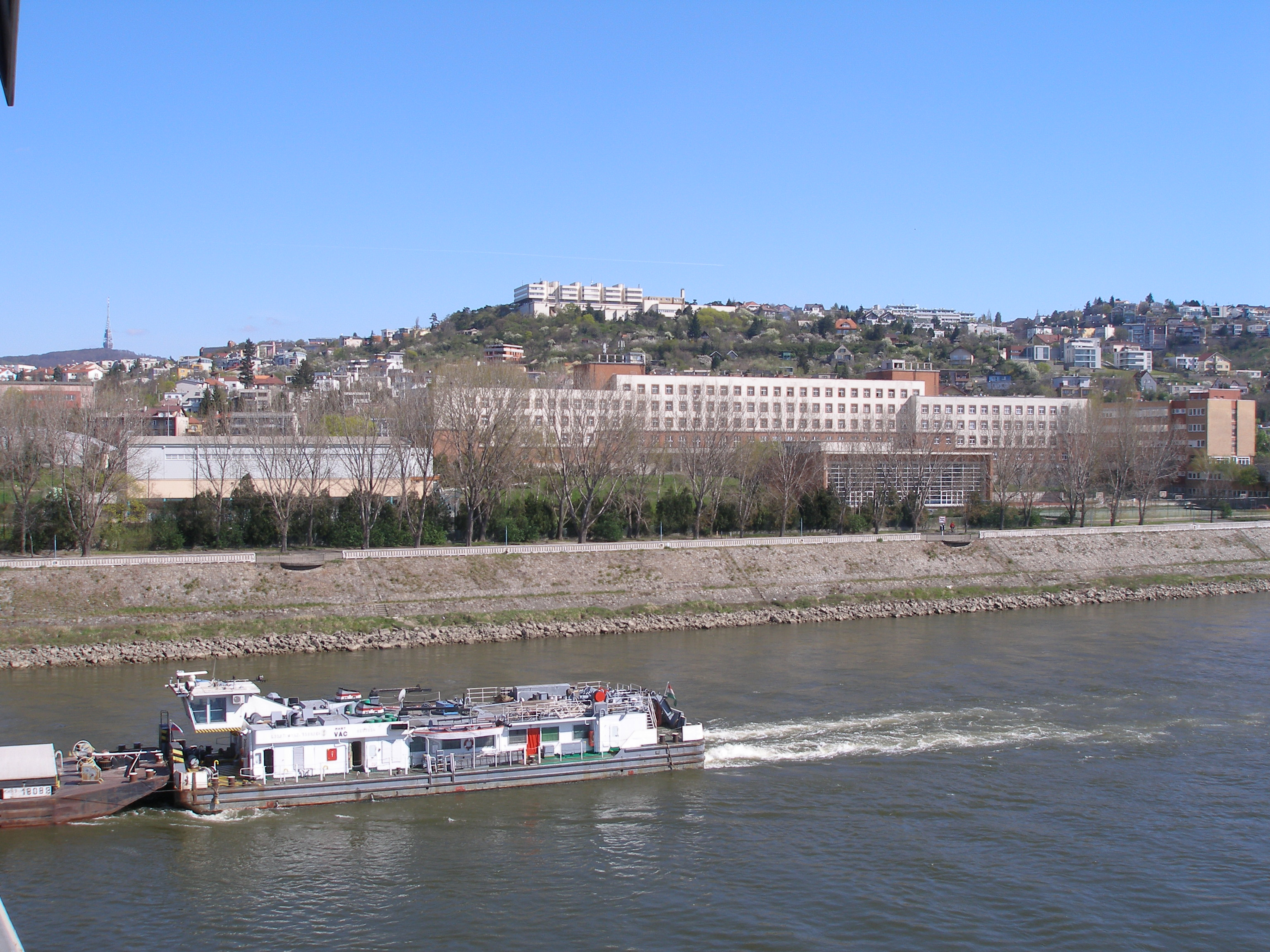 Rieka Dunaj v pozadí vysokoškolský internát Lafranconi.